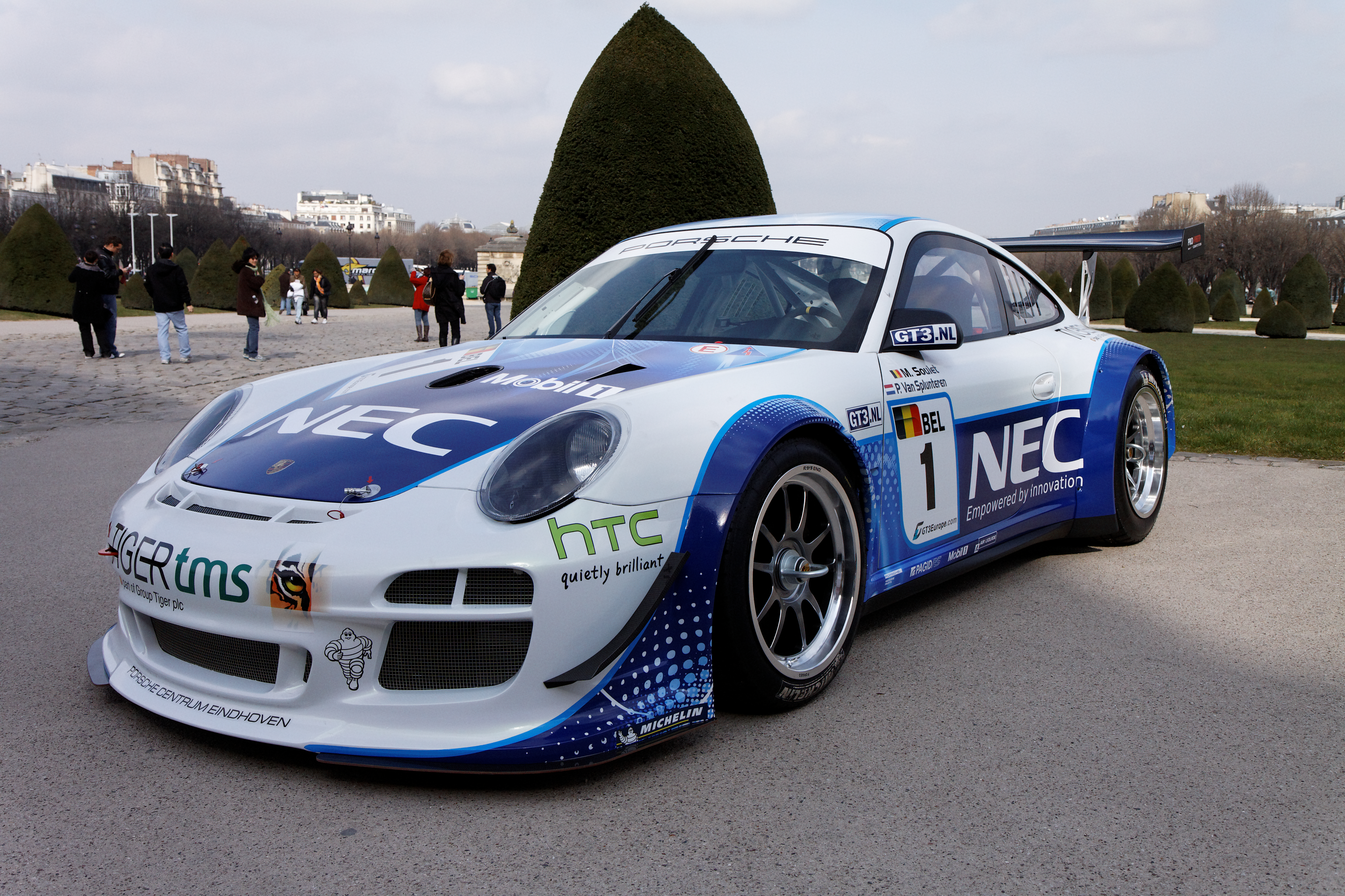 Photographie prise lors de la présentation du Blancpain Endurance series aux Invalides à Paris en mars 2011.